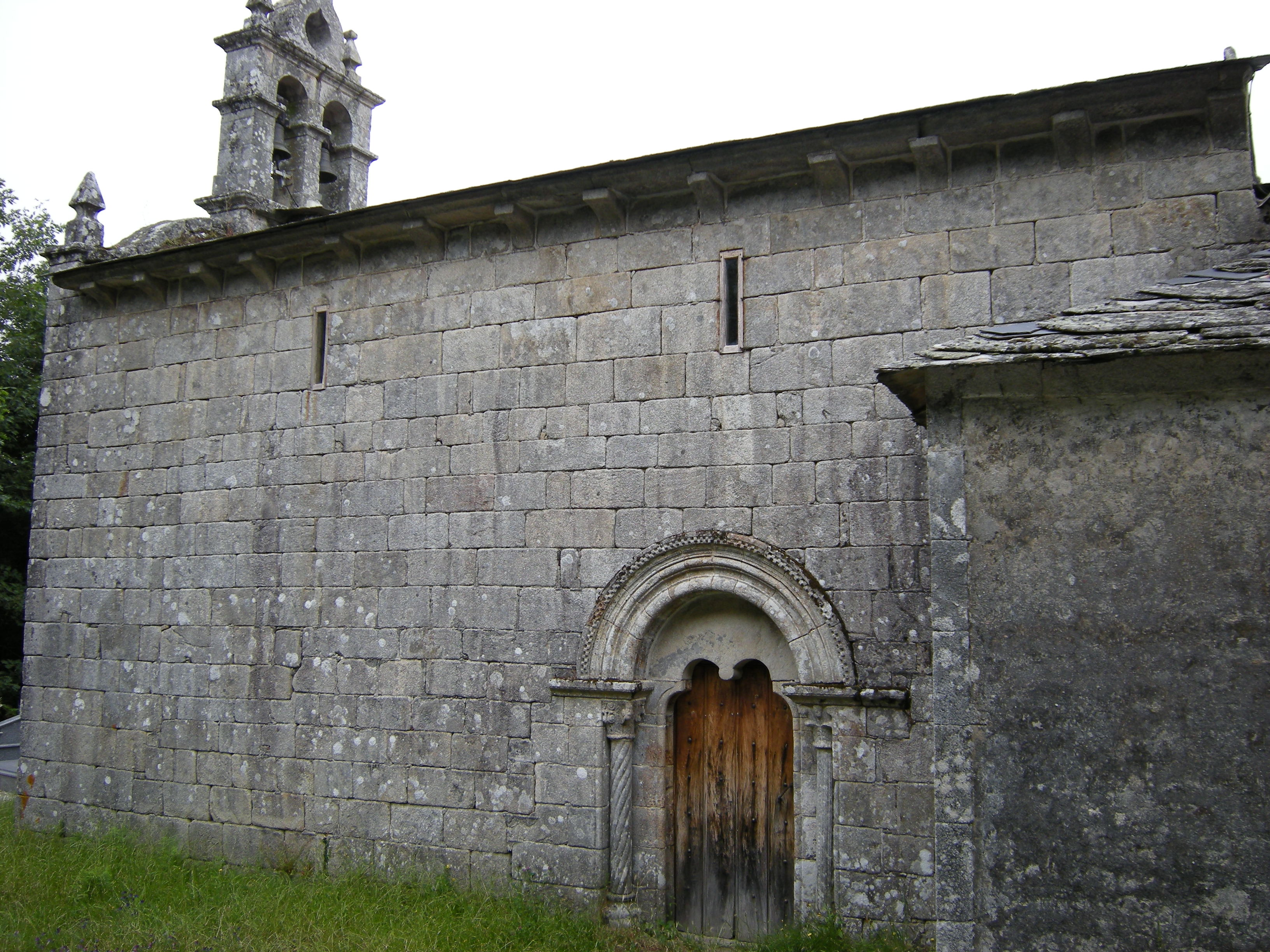 Muro sur de la nave